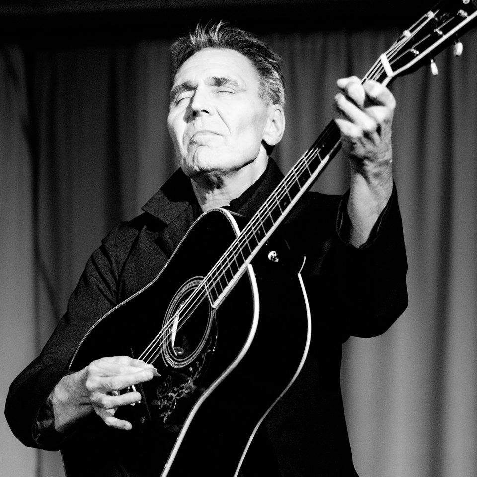 Foto af sangeren Carsten Bo